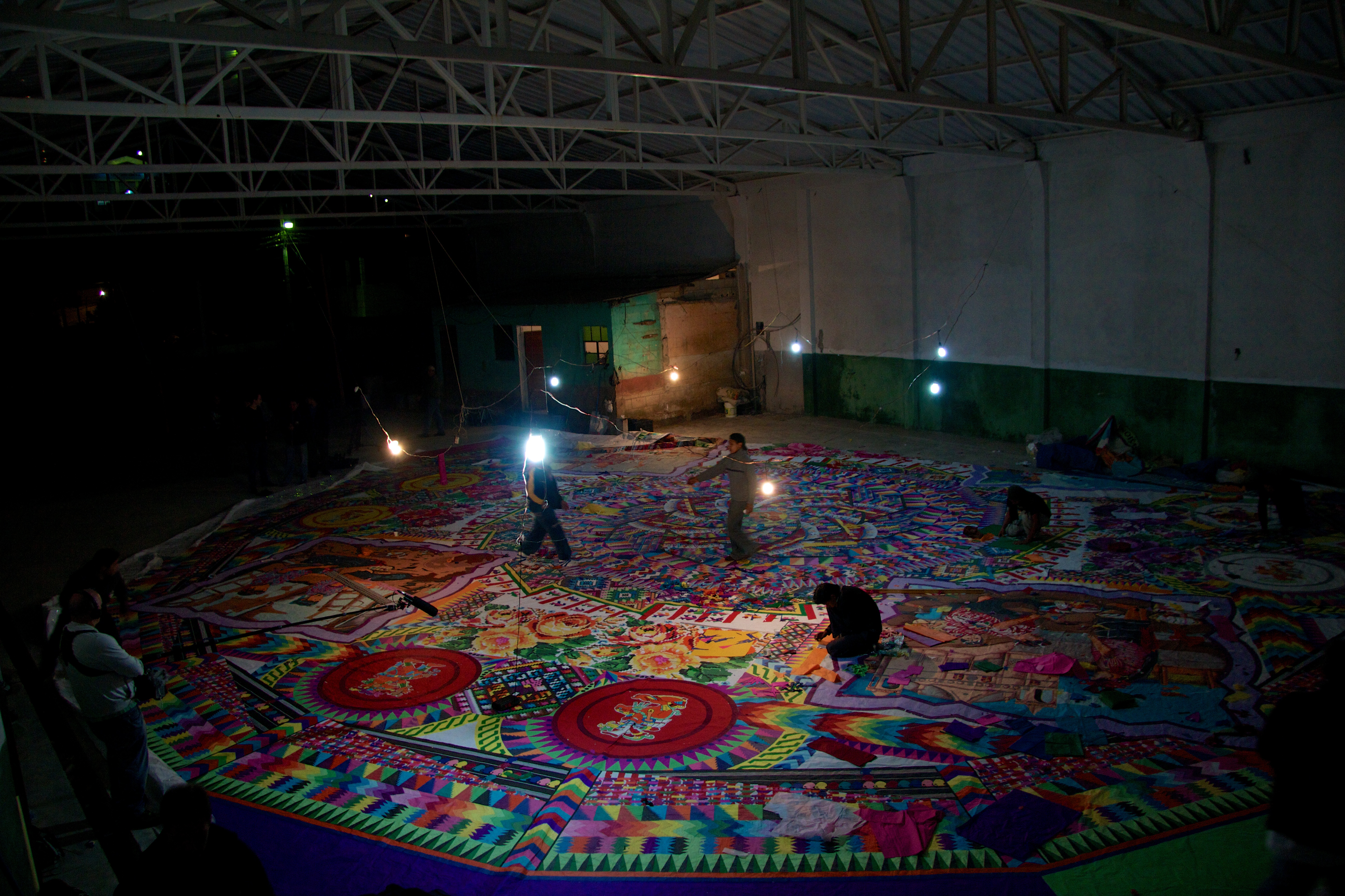 Festival de barriletes gigantes de Santiago Sacatepéquez, Guatemala. Trabajo por las noches, construyendo un barrilete gigante para el festival del 1 y 2 de noviembre de 2012.